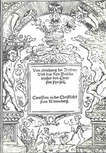 Andreas Bodenstein von Karlstadt: Von Abtuhung der Bylder, vnd das keyn Betdler vnther den Christen seyn soll.